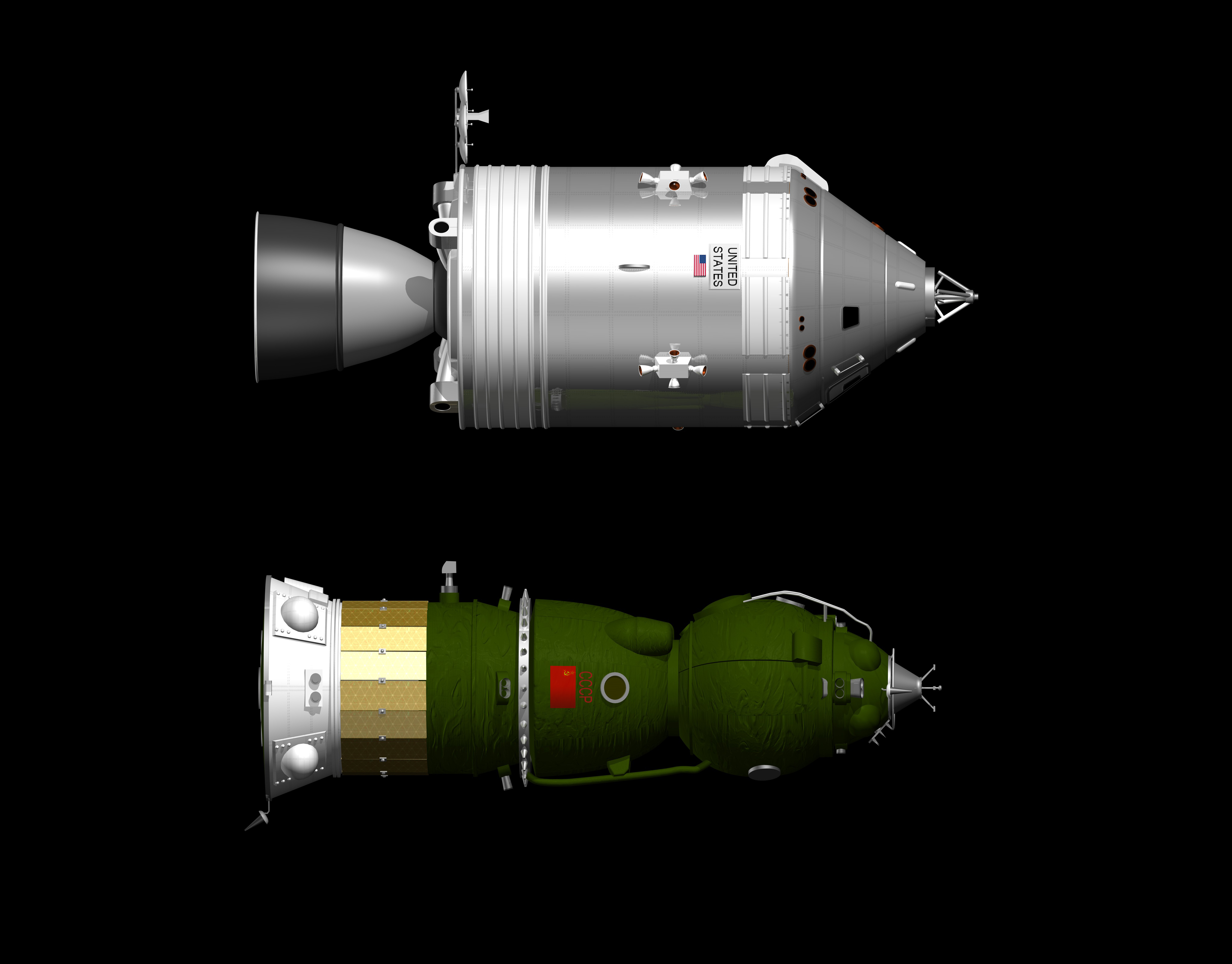 Darstellung des Größenvergleiches Apollo-LOK